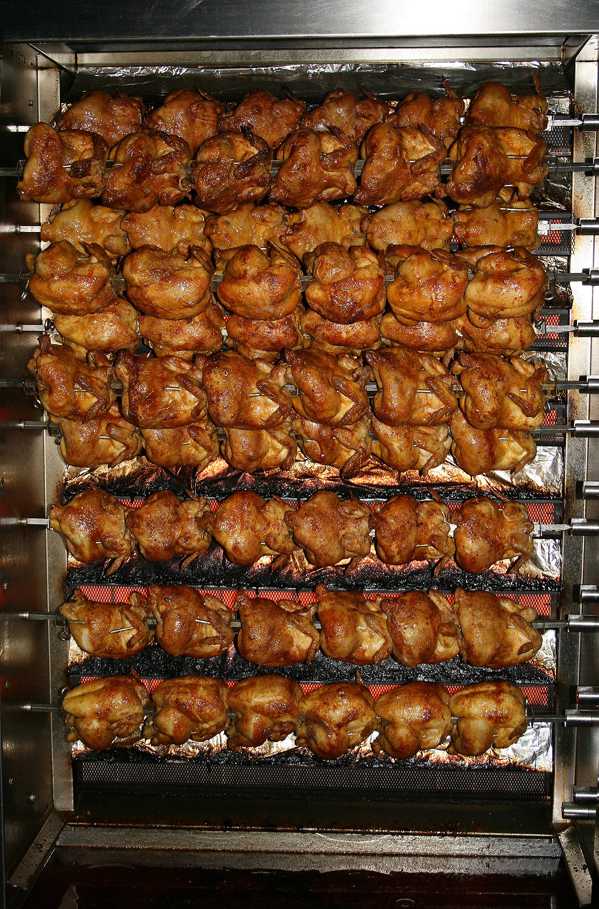 Donauinselfest 2007, Grillhendl